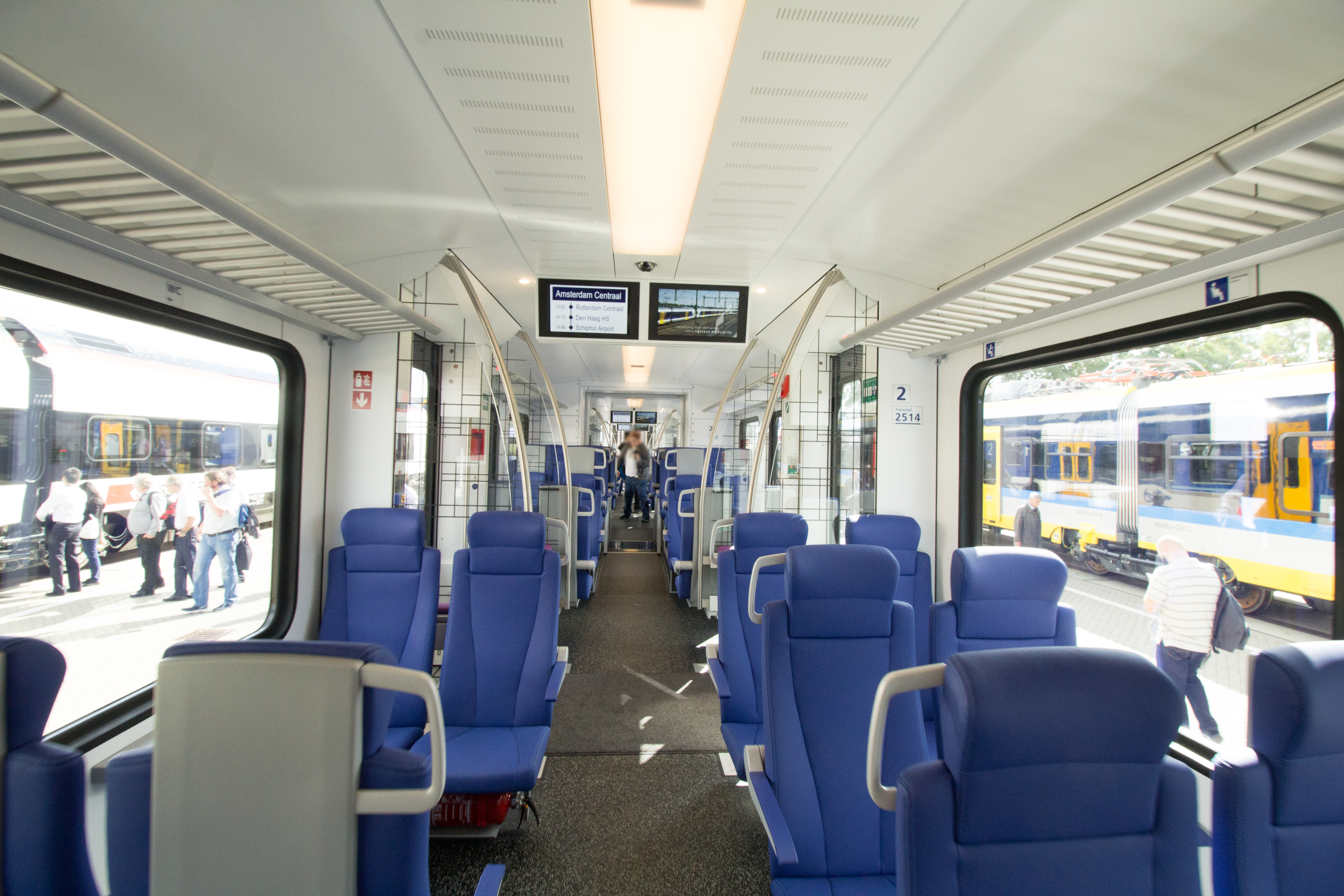 innoTrans 2016 - Stadler FLIRT of Nederlandse Spoorwegen